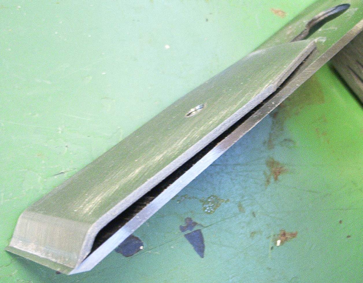 zelf gemaakte foto bestemd voor het publiek domein. Martink. Categorie:Afbeelding gereedschap